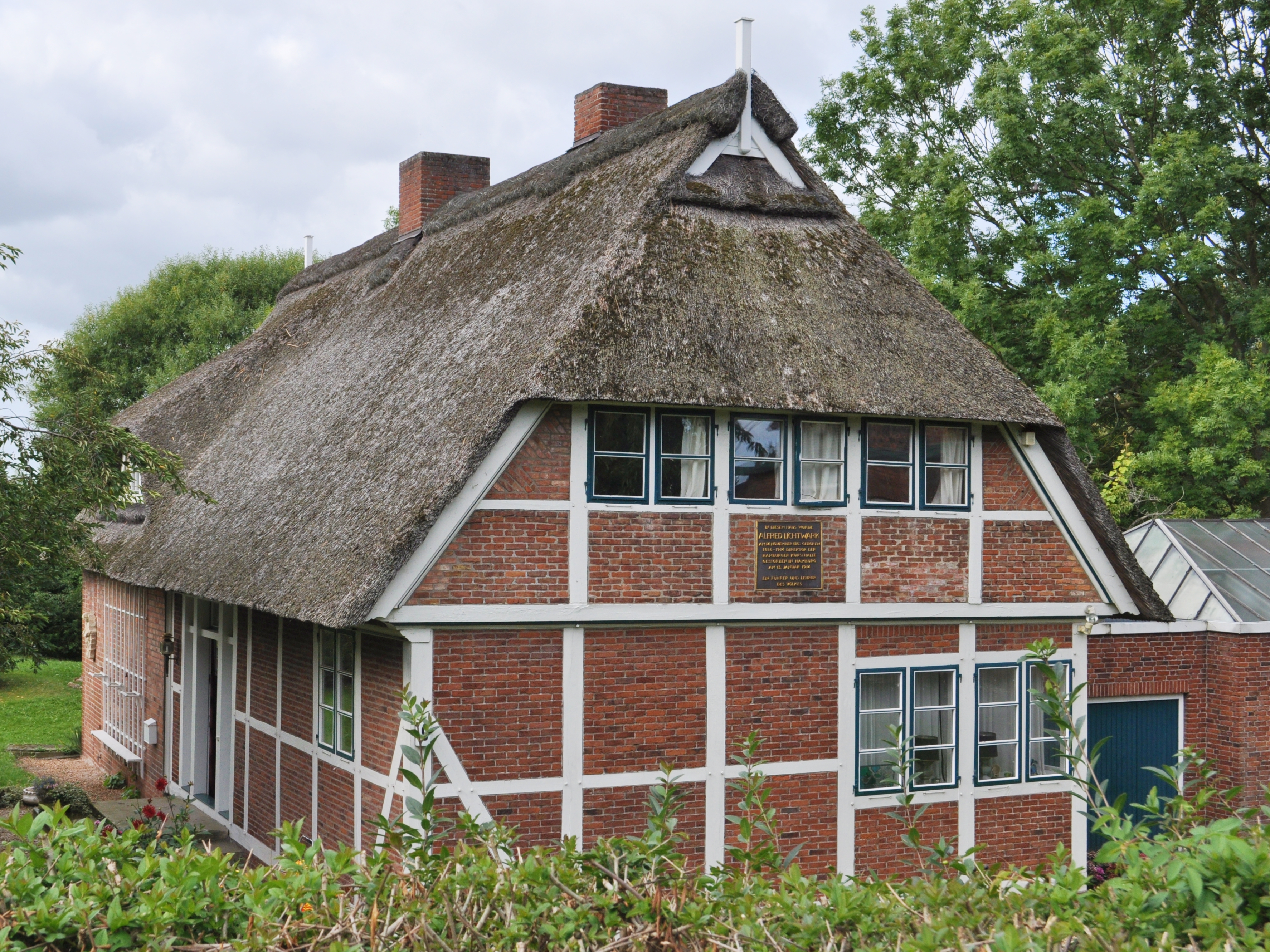 Haus Vorderdeich 9 in Hamburg-Reitbrook, Geburtshaus von Alfred Lichtwark. This is a photograph of an architectural monument.